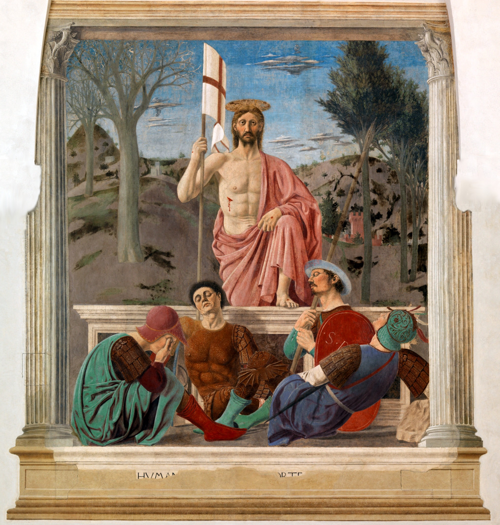 Piero della Francesca - Resurrezione nel 2018, dopo il restauro.